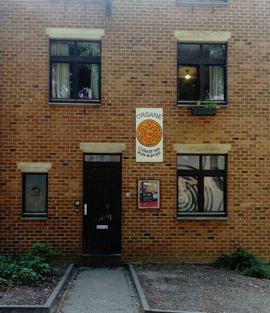 Façade classique d'un KAP avec son logo